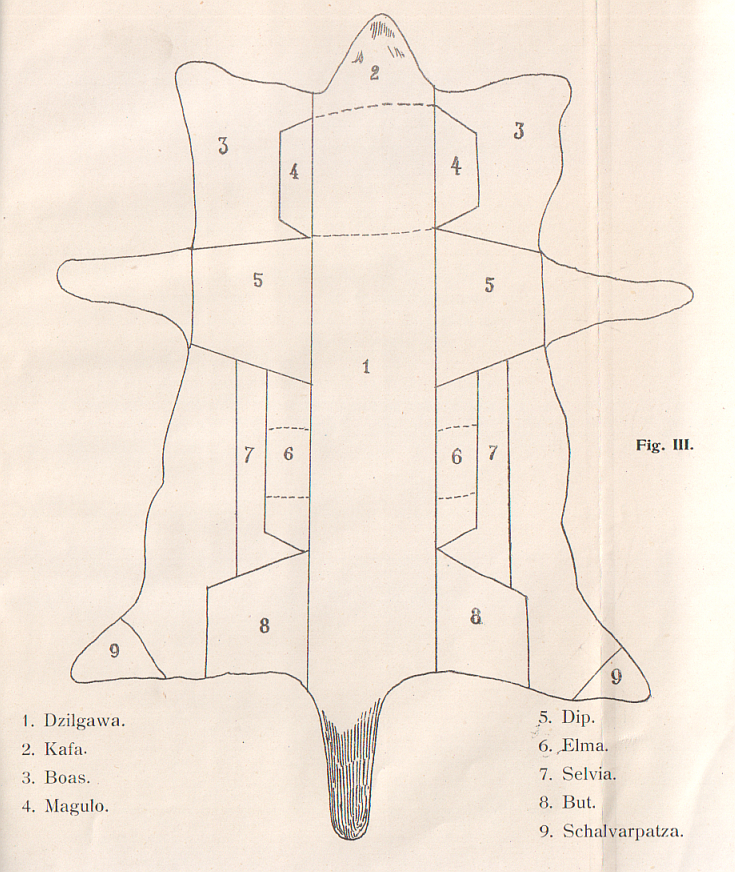 Beschreibung siehe unter → Pelzreste Aus: D. Totchkoff (Ochrida): Studien über Rauchwarenhandel und Kürschnerei, insbesondere in Ochrida (Macedonien). Inaugural-Dissertation zur Erlangung der Doktorwürde der philosophischen Fakultät der Universität Heidelberg. Universitäts-Buchdruckerei und Verlag, vorm. Ph. Wiese, Heidelberg 1900